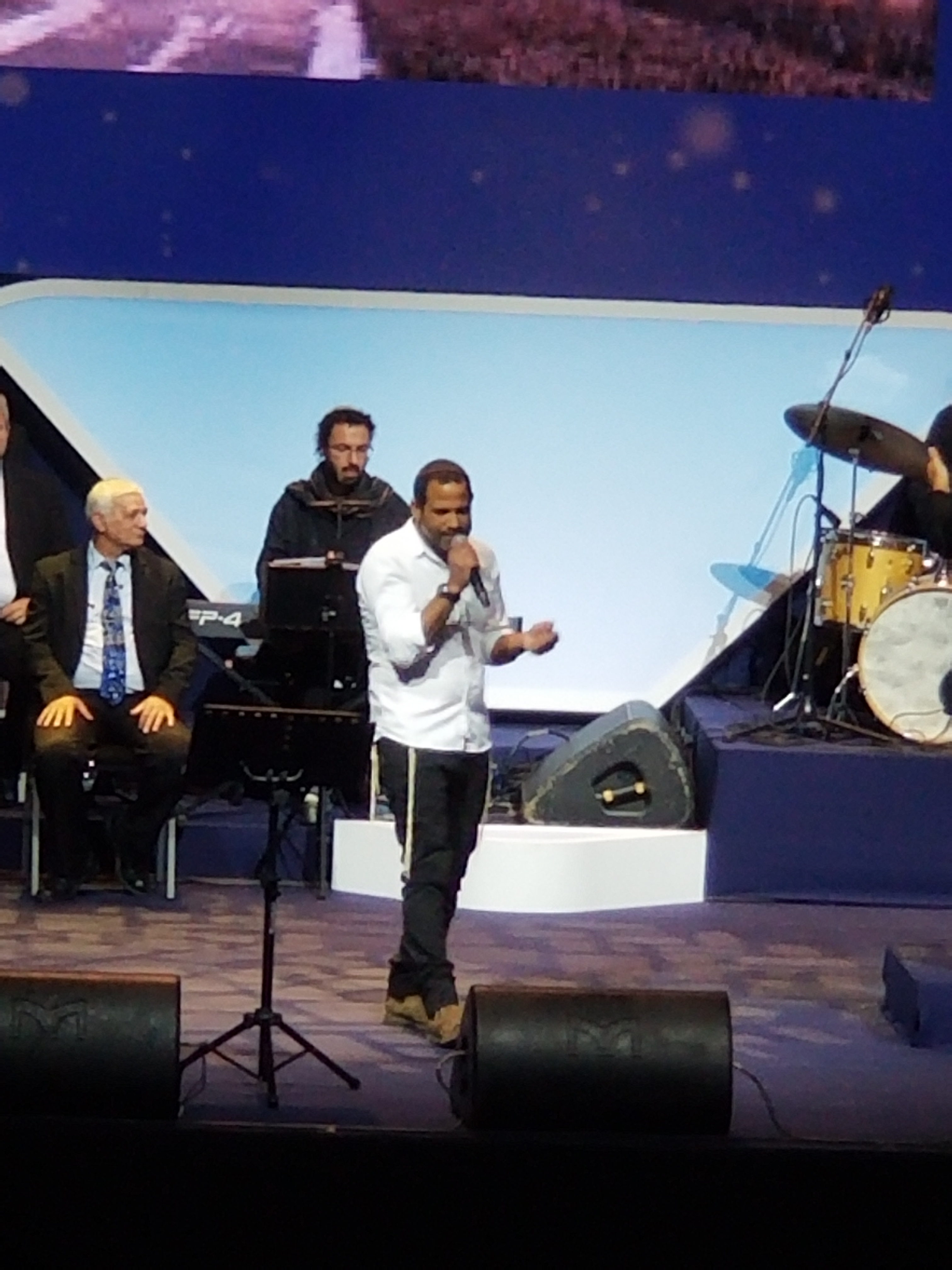 אודי דוידי באירוע סיום הדף היומי 2020